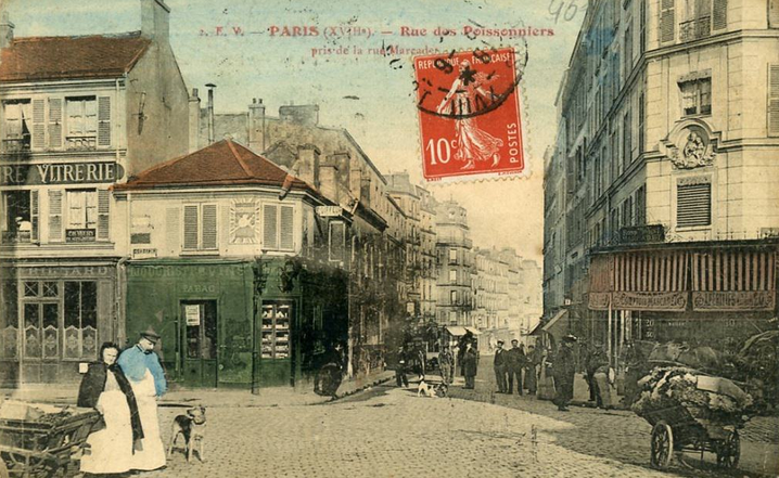 Rue des Poissoniers. Paris XVIIIè arrondissement.